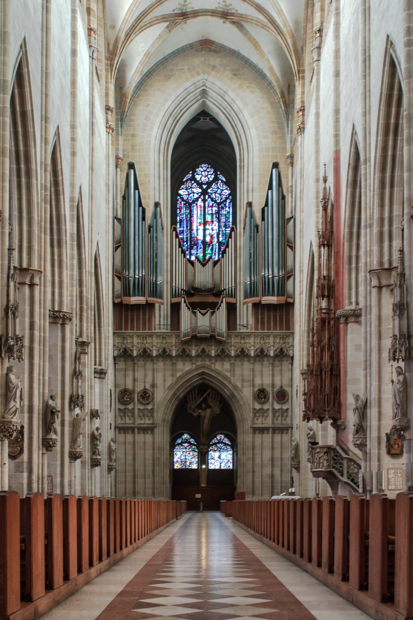 Ulmer Muenster - Blick zur Hauptorgel (West) 2013